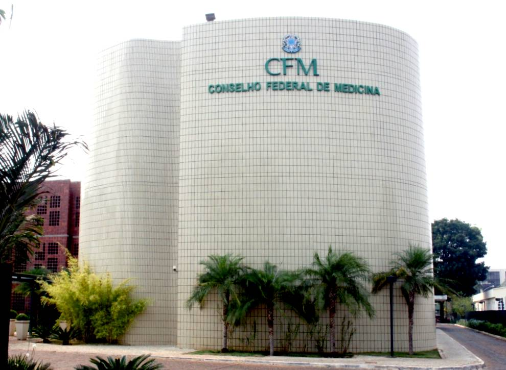 Sede do Conselho Federal de Medicina em Brasília